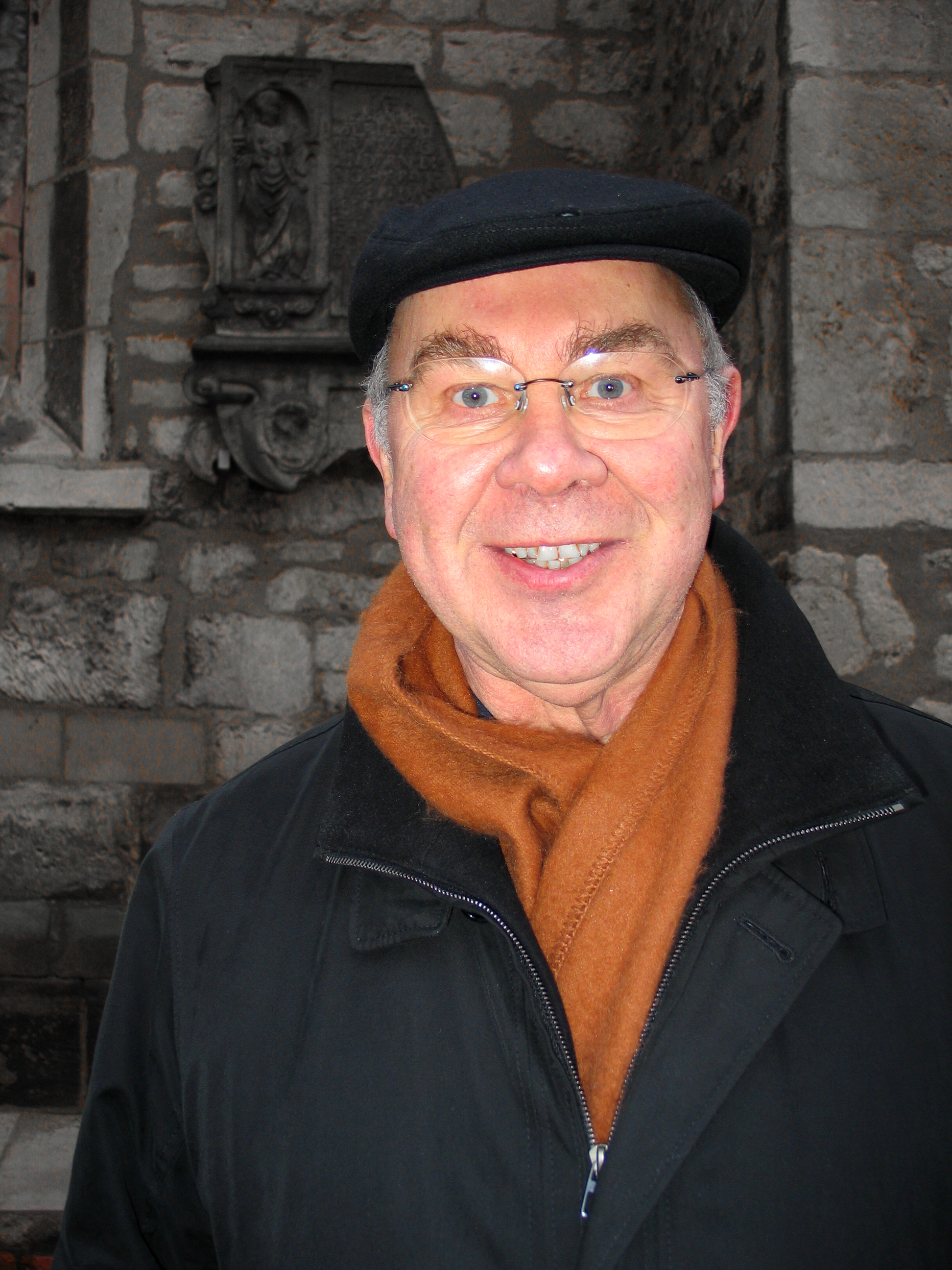 Der evangelisch-lutherische Theologe, ehemalige Landessuperintendent und Sprecher des Vereins Renaissance Gartenfriedhof, Dieter Zinßer ...